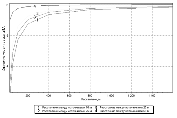 Абсолютно намаление на нивото на звука от източник с крайна дължина при различни разстояния между единичните източници и при постоянен брой на източниците n=20.